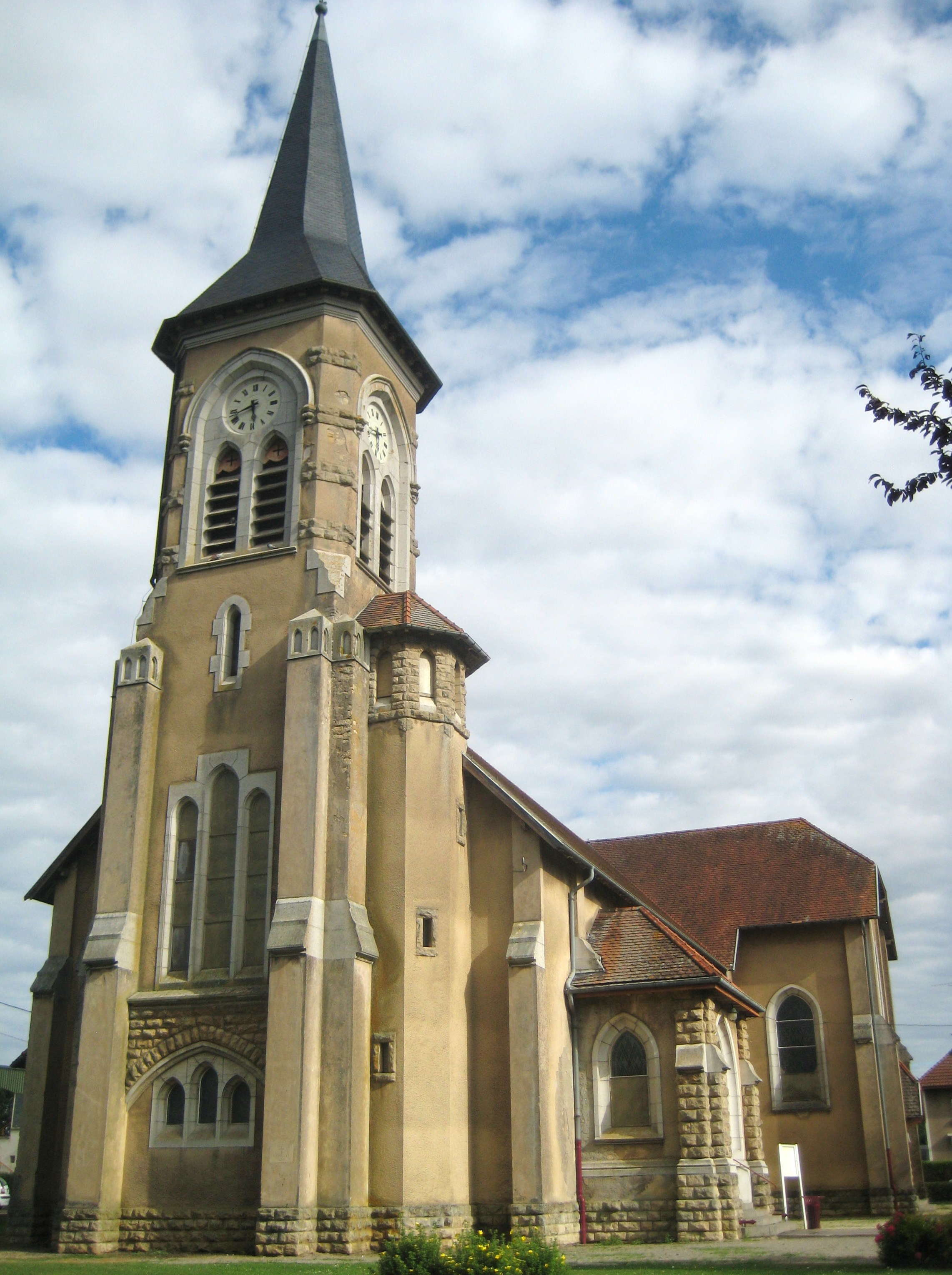 Description eglise Saint-Nicolas Giraumont eglise Saint-Nicolas Giraumont